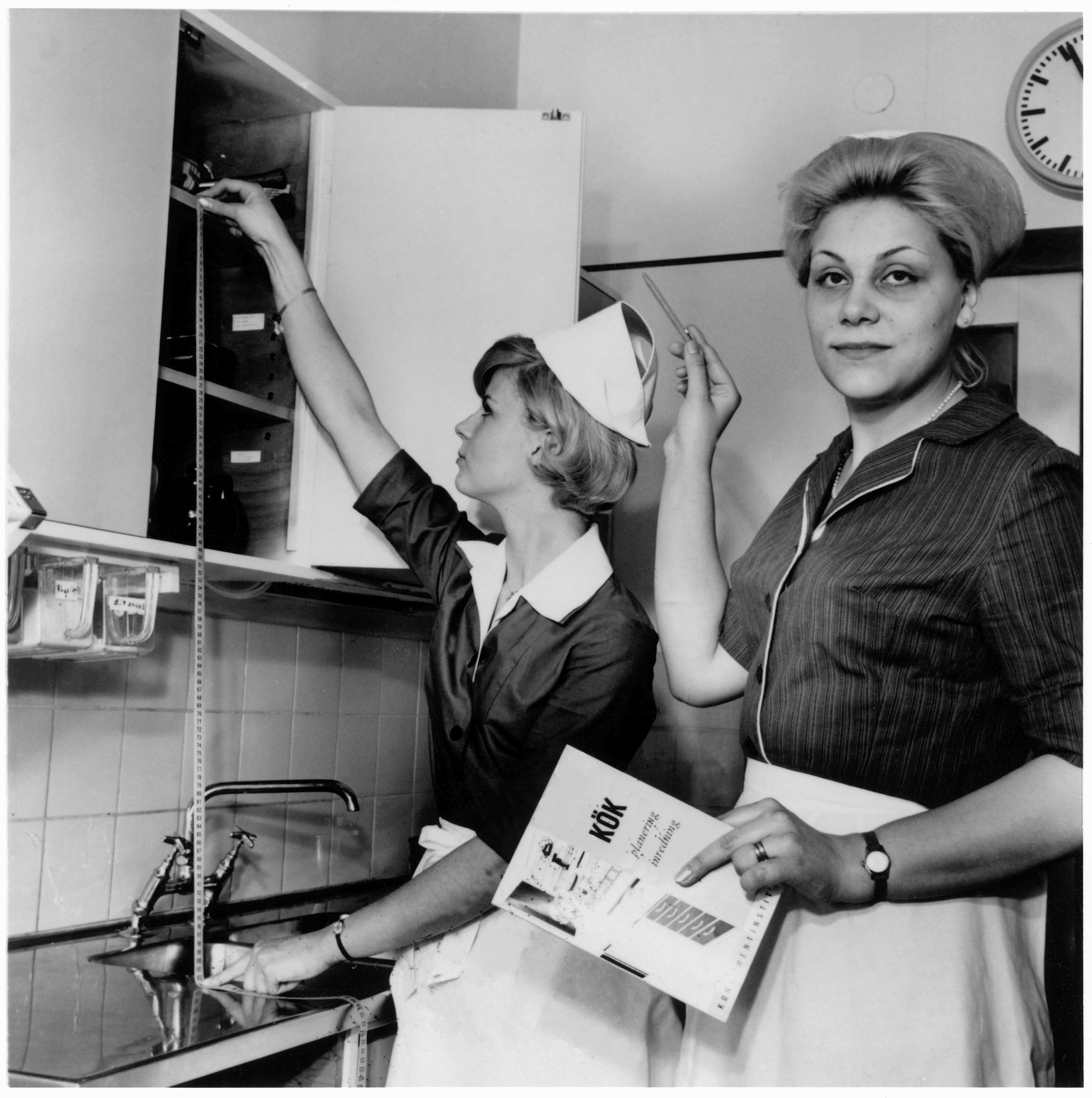 Studier i kök på 1940-talet Kritiken mot 30-talets små kök var stark. Det blev inte som arkitekterna trott - att framtidens kök mest skulle användas för att värma färdiga konserver. På 40-talet försökte man ta reda på hur behoven verkligen såg ut. Hemmens forskningsinstitut som bildades 1944, koncentrerade sig främst på köket och utförde funktions- och utrymmesstudier i full skala. Med utgångspunkt i dessa studier fastställdes den första svenska köksstandarden 1950 som i stort sett är densamma som i dag.